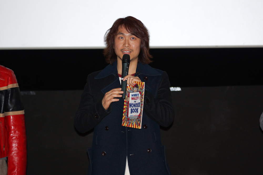 배우 오정세